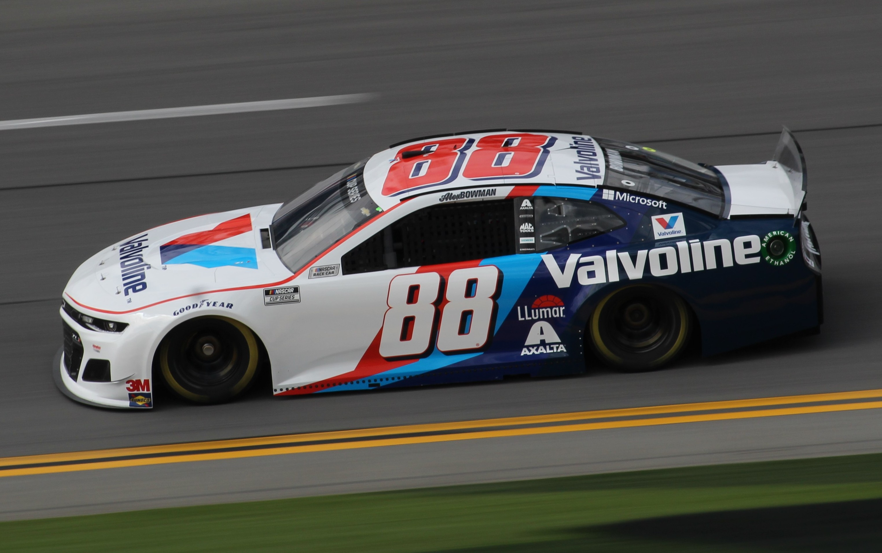 Daytona Speekweeks, 2020